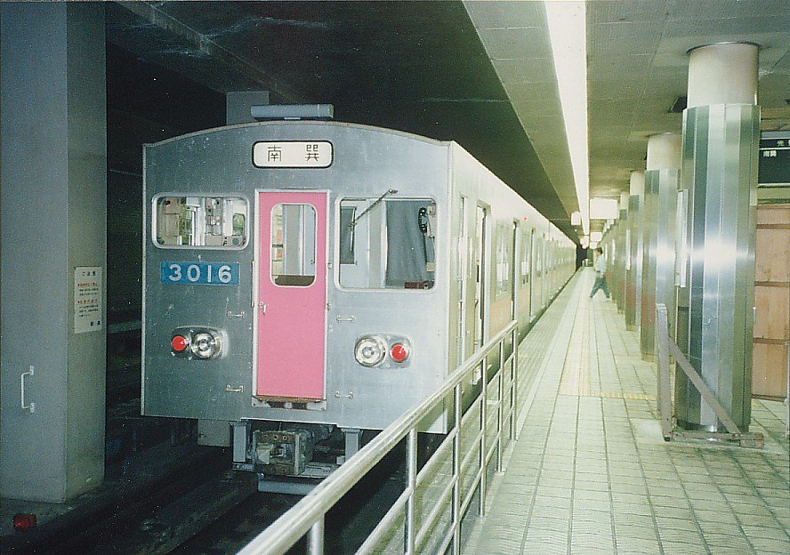 大阪市交通局30系電車 千日前線仕様